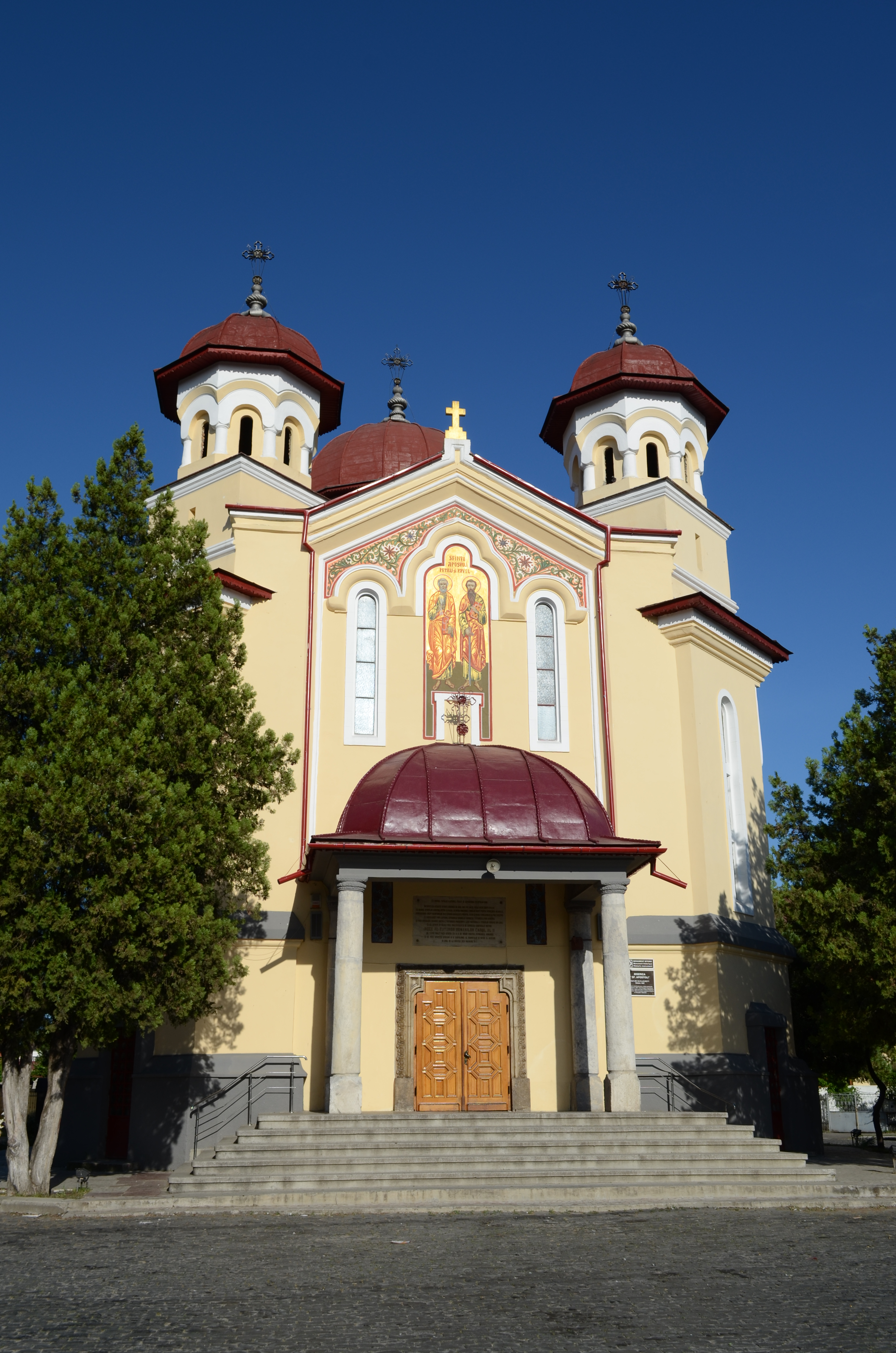 Biserica "Sfinții Apostoli Petru și Pavel", Calea Eroilor, Târgu Jiu